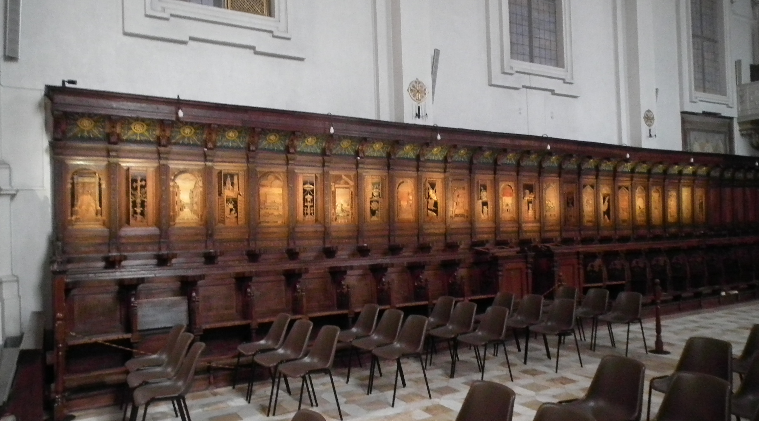 Marqueteries de Mont Olivet Majeur. Vue générale et disposition de l'éclairage.